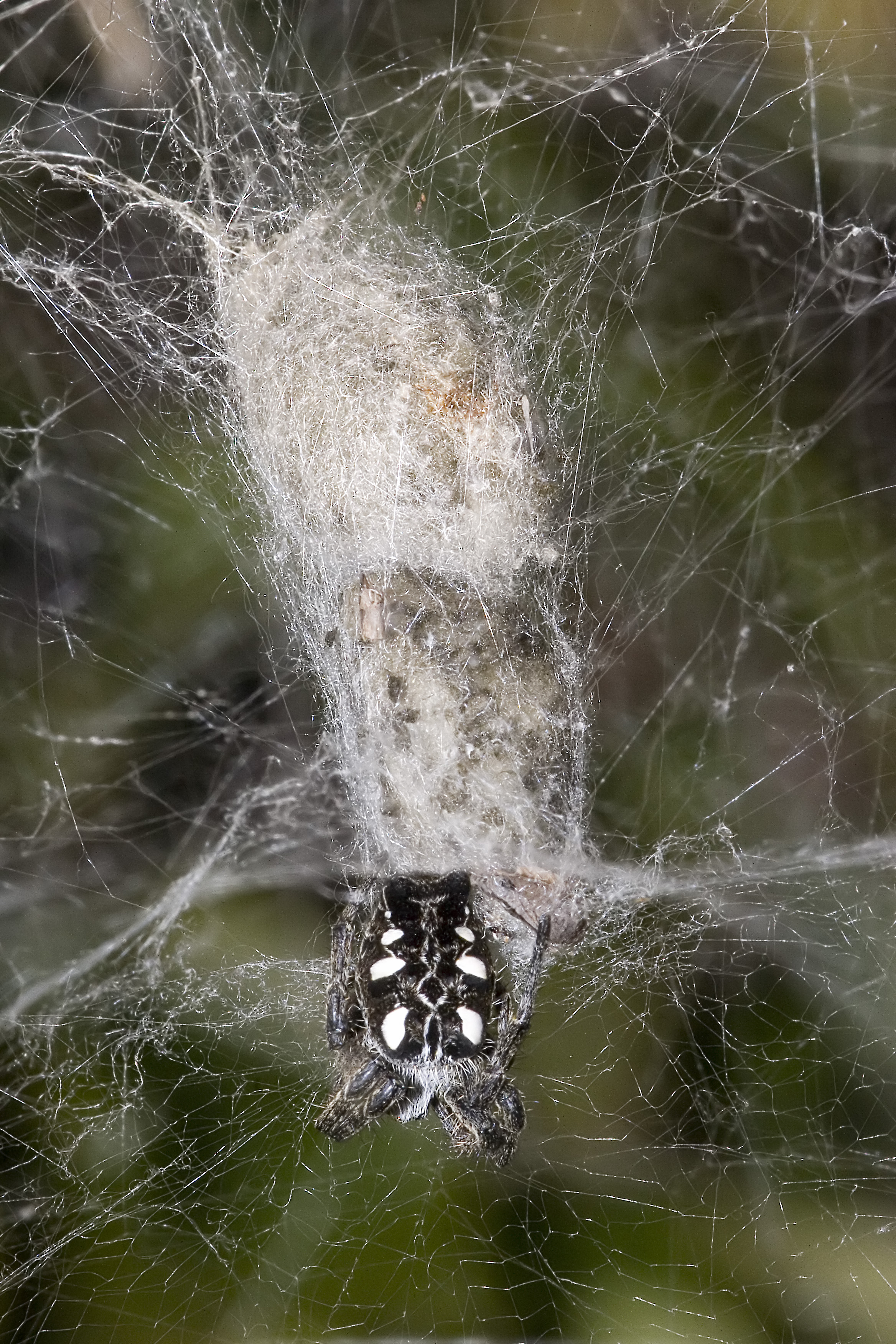 Cyrtophora citricola (Forskäl, 1775)